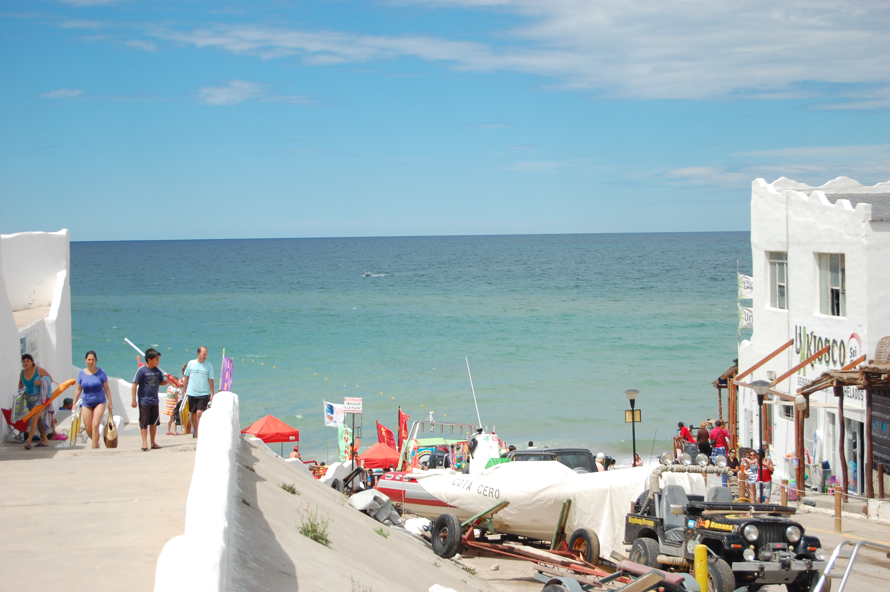 Rio Negro